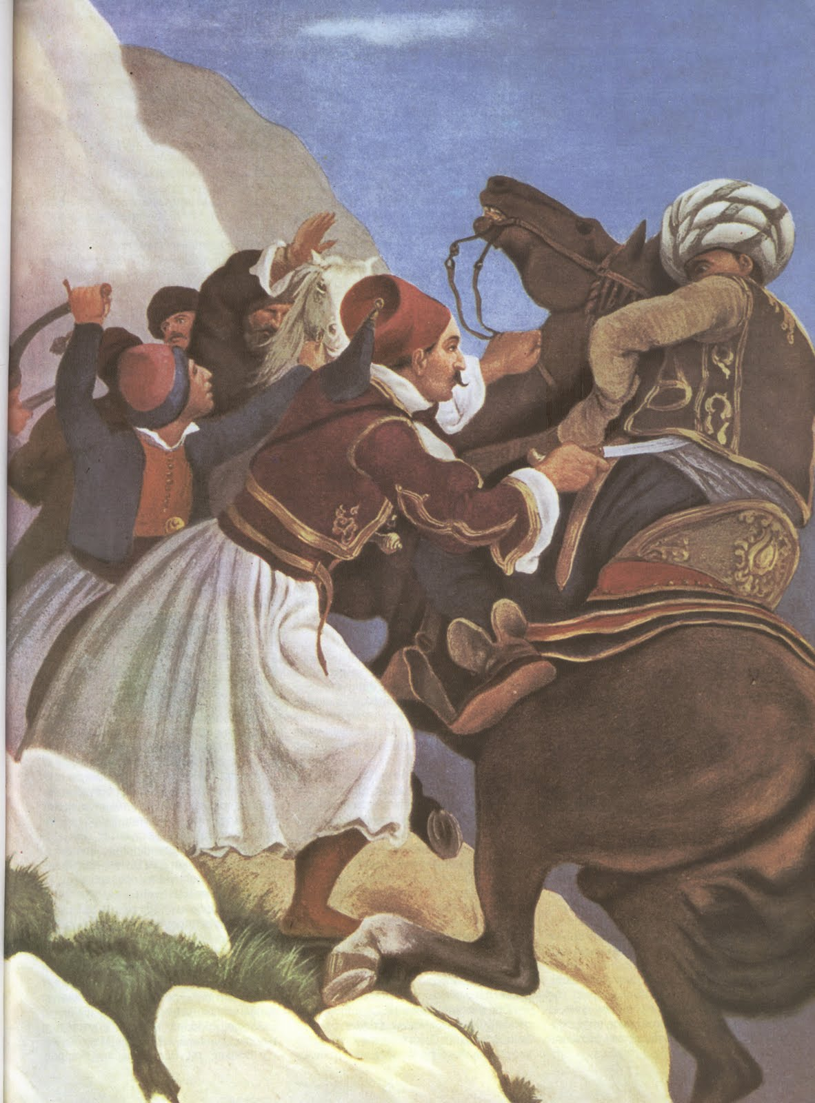 Νικηταράς, «Ο Νικηταράς κατακριμνίζει Τούρκο ιππέα στα Δερβενάκια.»